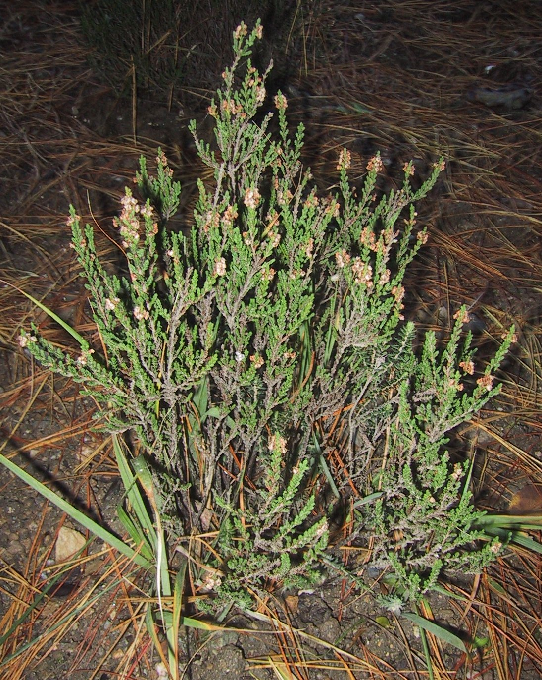 Calluna vulgaris